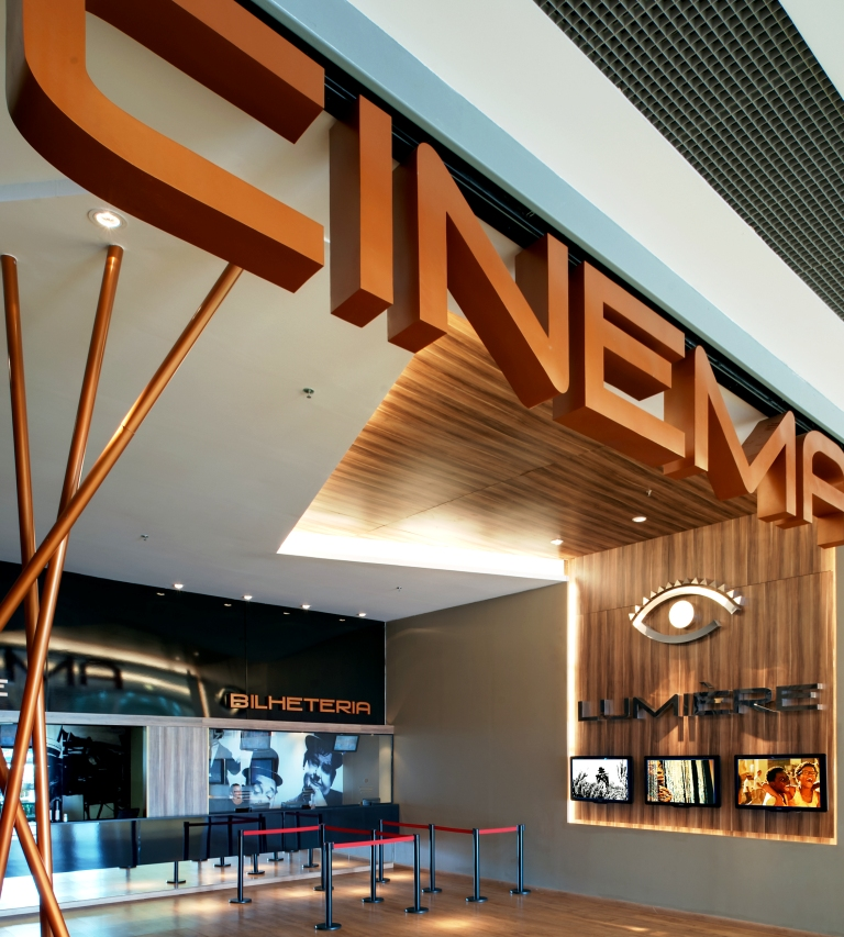 Entrada do Lumière Empresa Cinematográfica do Portal Shopping Sul de Aparecida de Goiânia